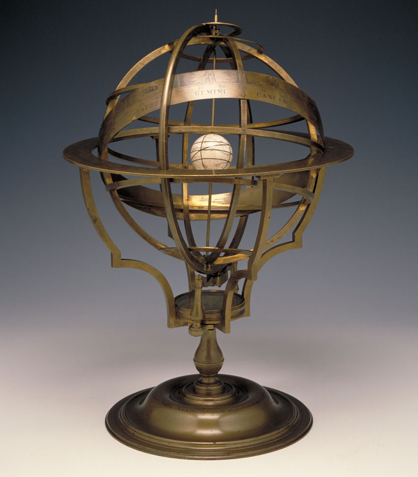 Esfera Armilar. 1765. Colección del Museo Nacional de Ciencia y Tecnología (MUNCYT)